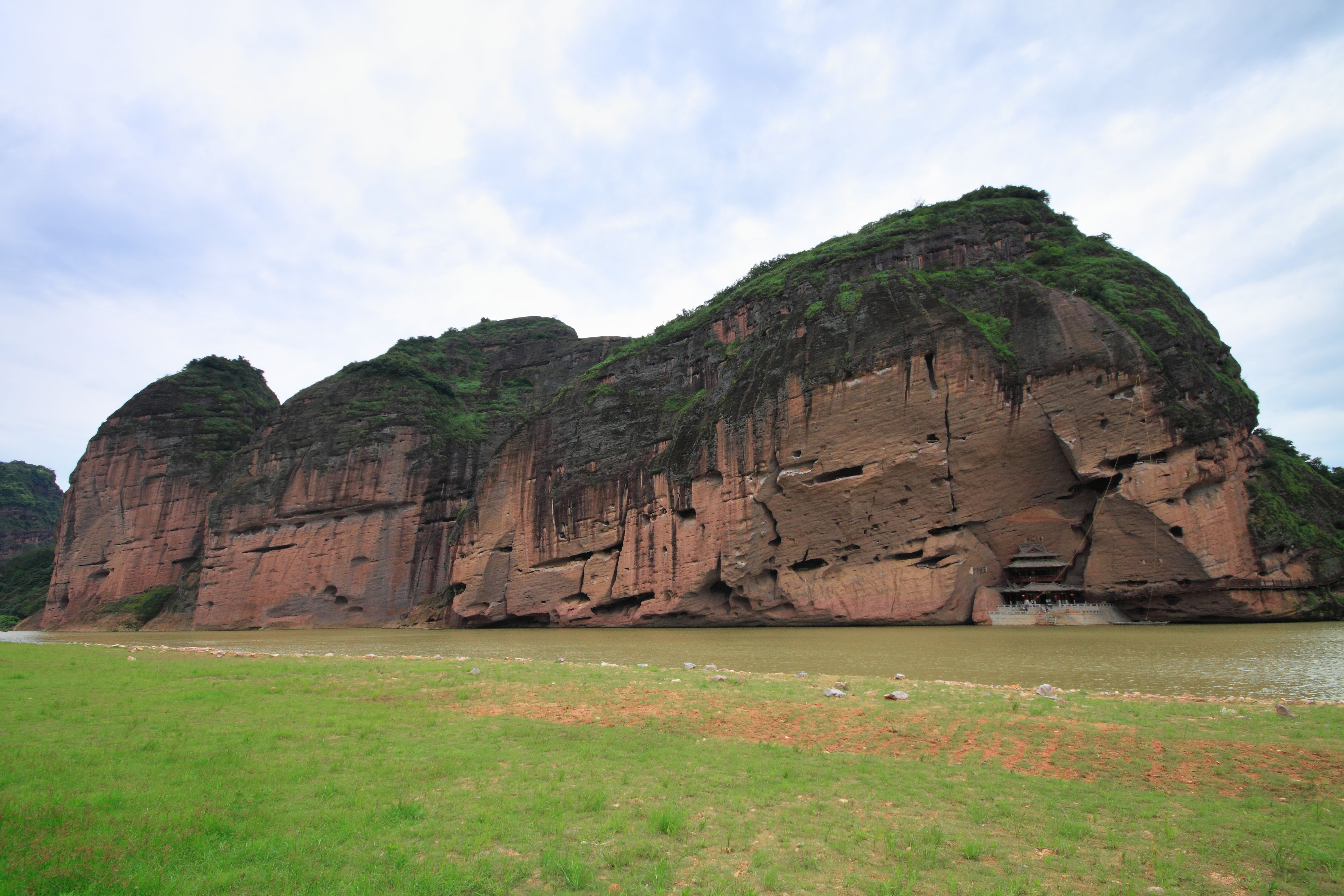 江西龙虎山仙水岩崖墓群